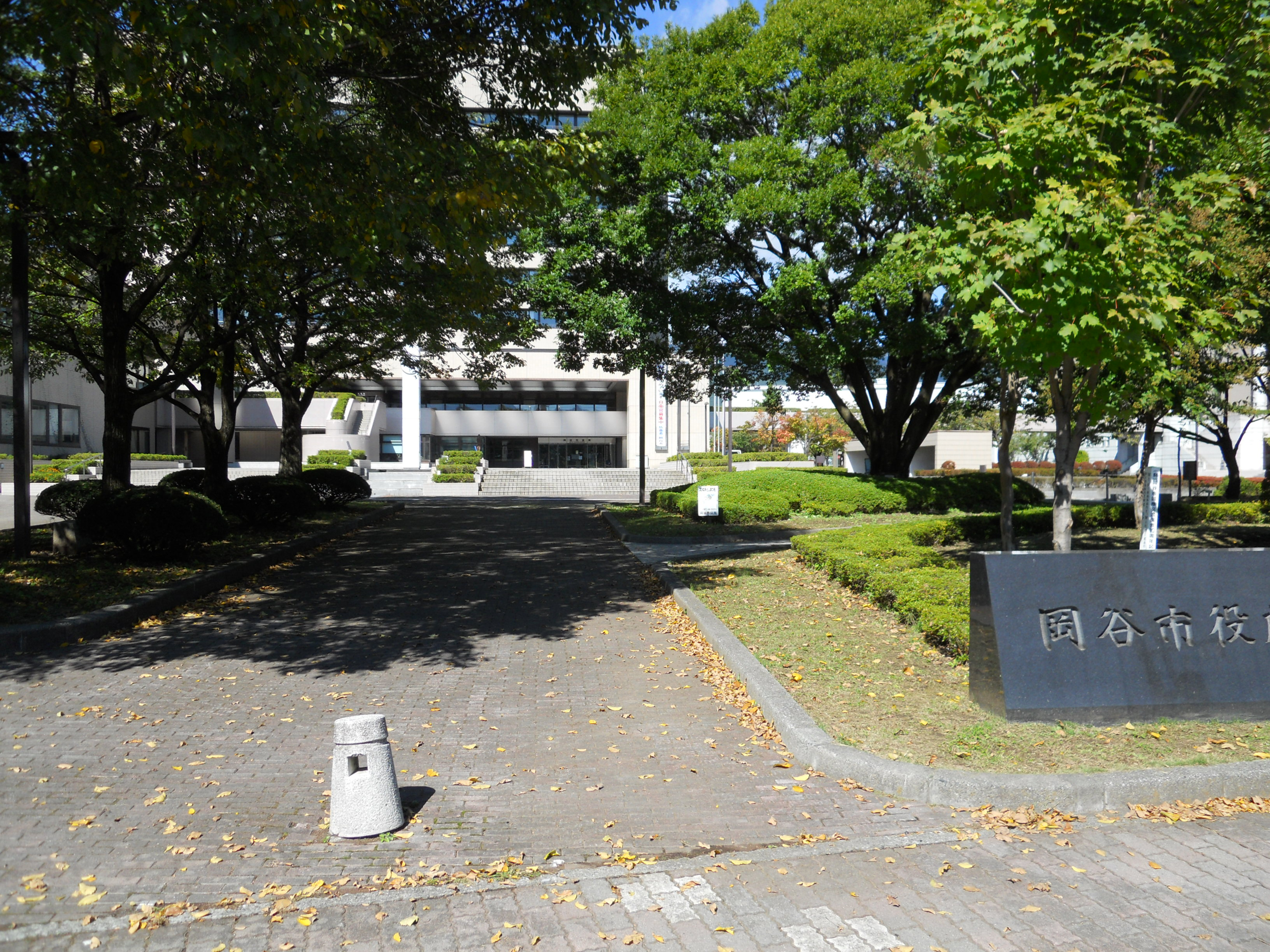 岡谷市役所